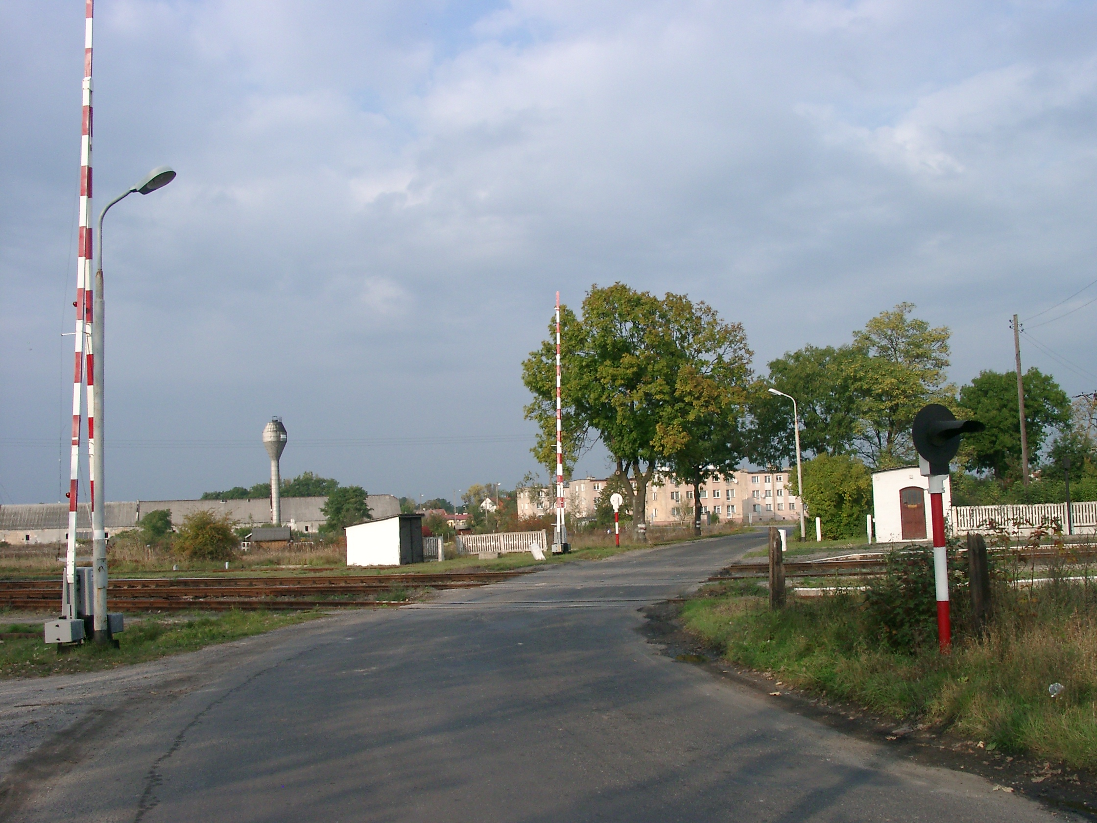 Dworzec kolejowy w Rokitkach koło Chojnowa Railway station Rokitki near Chojnów